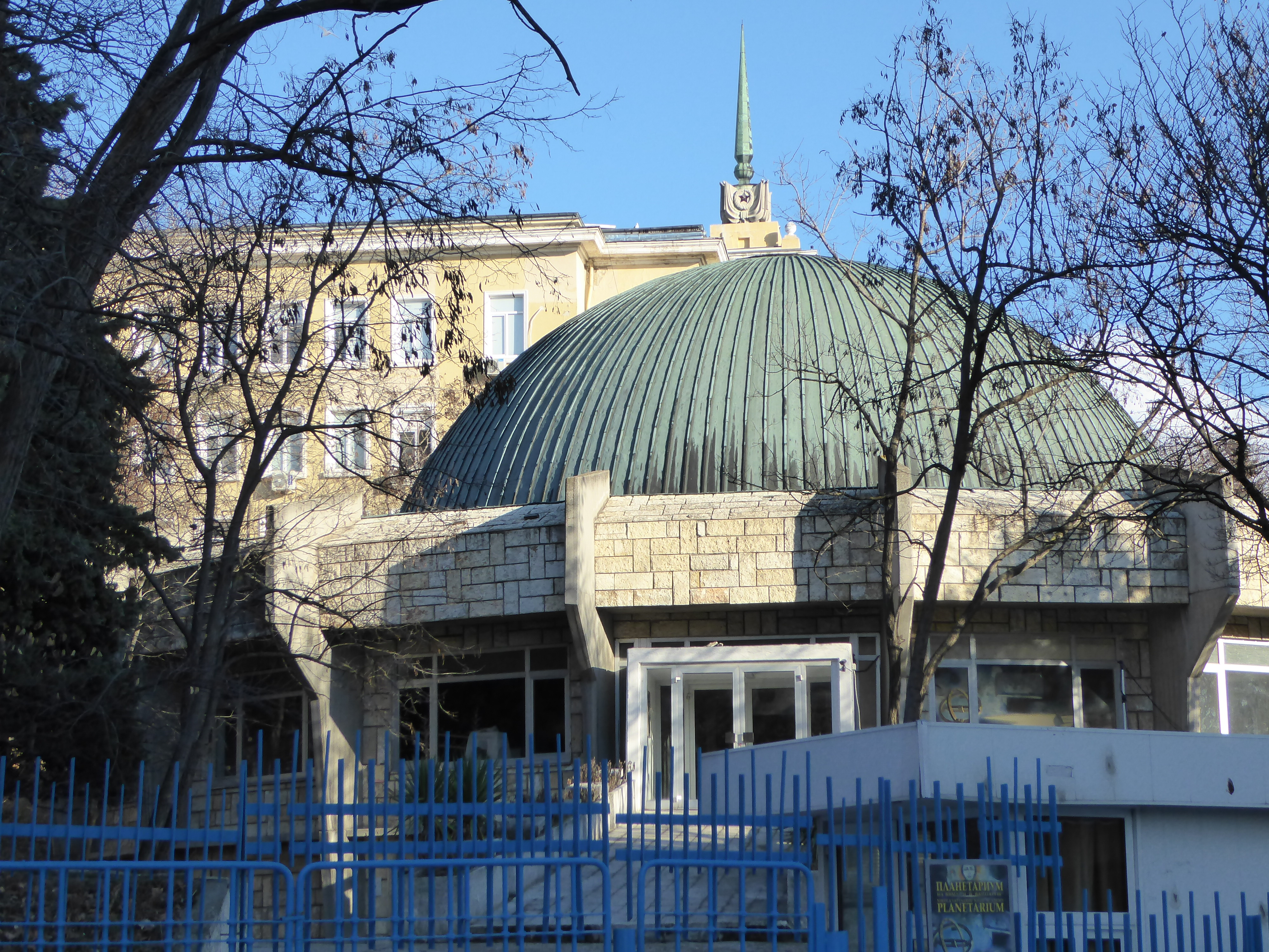 Планетариум: Висше Военноморско Училище „Никола Йонков Вапцаров“ (ВВМУ)